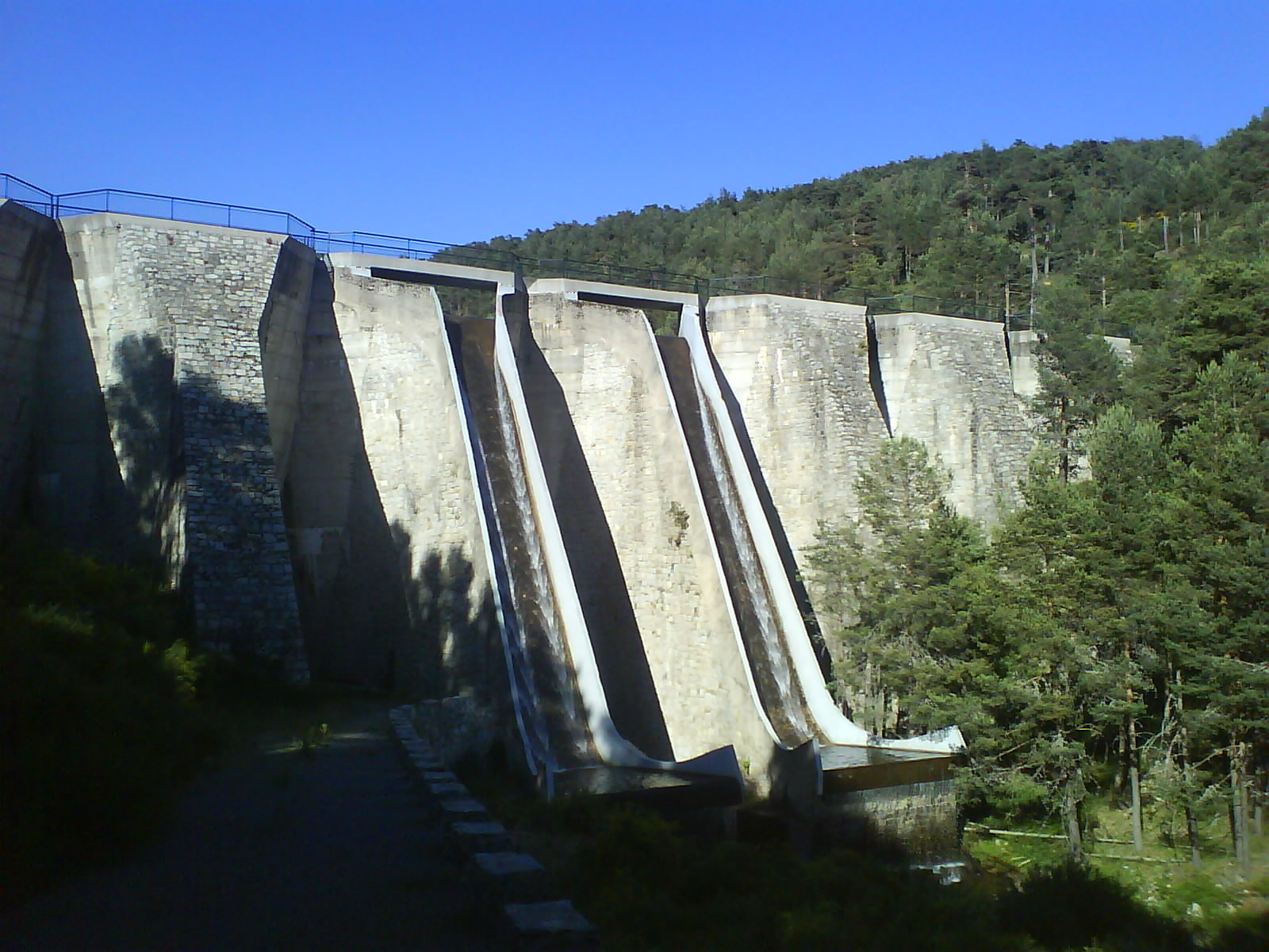 Valle del río Moros, presa del embalse del Vado de las Cabras. El Espinar, Segovia, España.